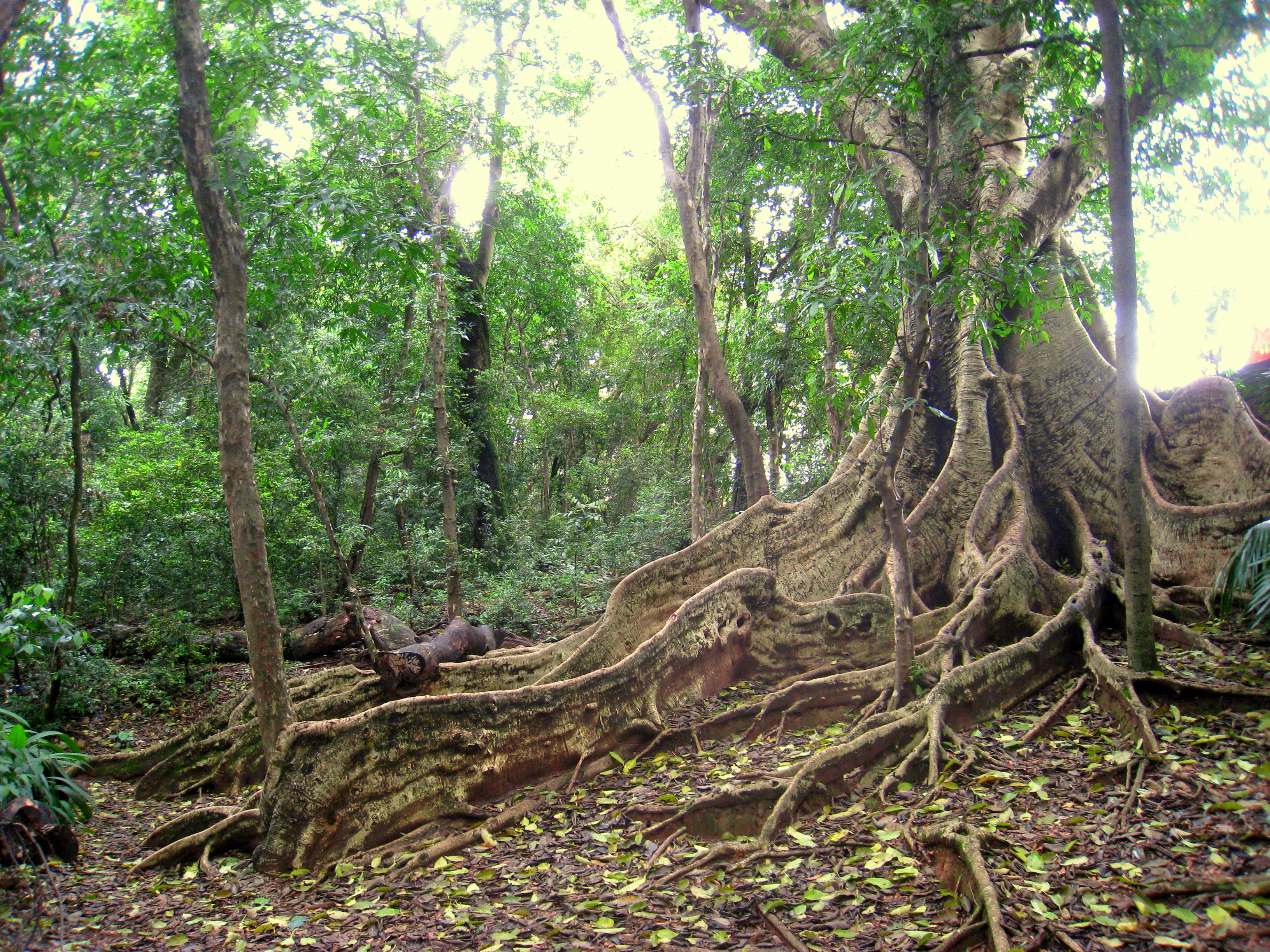 Bosque dos Jequitibás, Campinas, SP, Brazil.